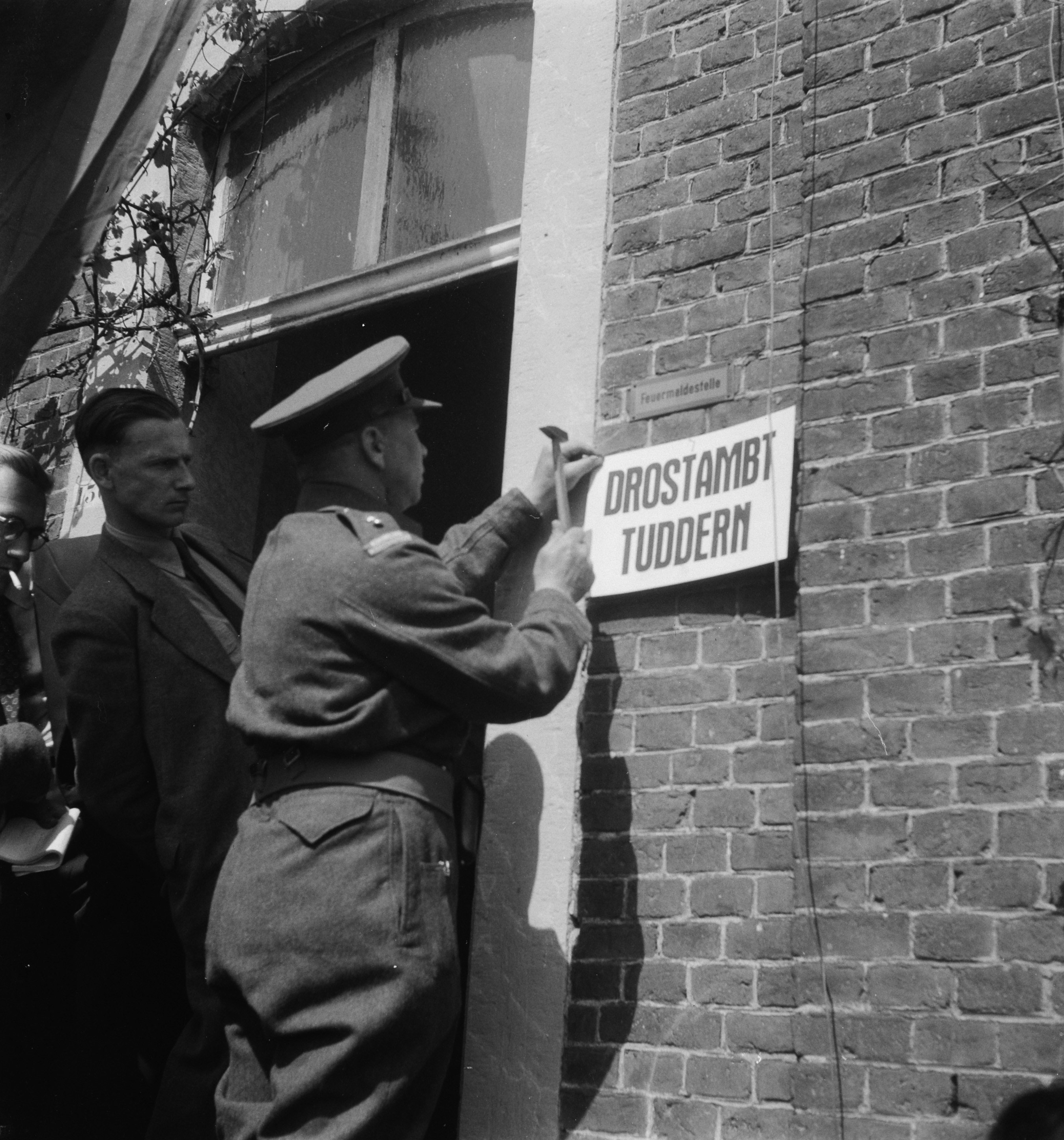 Collectie / Archief : Fotocollectie Anefo Reportage / Serie : Grenscorrectie Selfkant en Tudderen (bij Sittard) Beschrijving : Bord Drostambt Tuddern wordt vastgespijkerd Annotatie : De Duitse gemeente Selfkant is op 23 april 1949 (het gebied van de huidige gemeente exclusief Saeffelen) geannexeerd door Nederland als schadevergoeding voor de oorlog. Datum : 23 april 1949 Locatie : Tudderen Trefwoorden : borden, grenscorrecties, grenzen, spijkers Fotograaf : Noske, J.D. / Anefo, [onbekend] Auteursrechthebbende : Nationaal Archief Materiaalsoort : Negatief (zwart/wit) Nummer archiefinventaris : bekijk toegang 2.24.01.03 Bestanddeelnummer : 903-3299